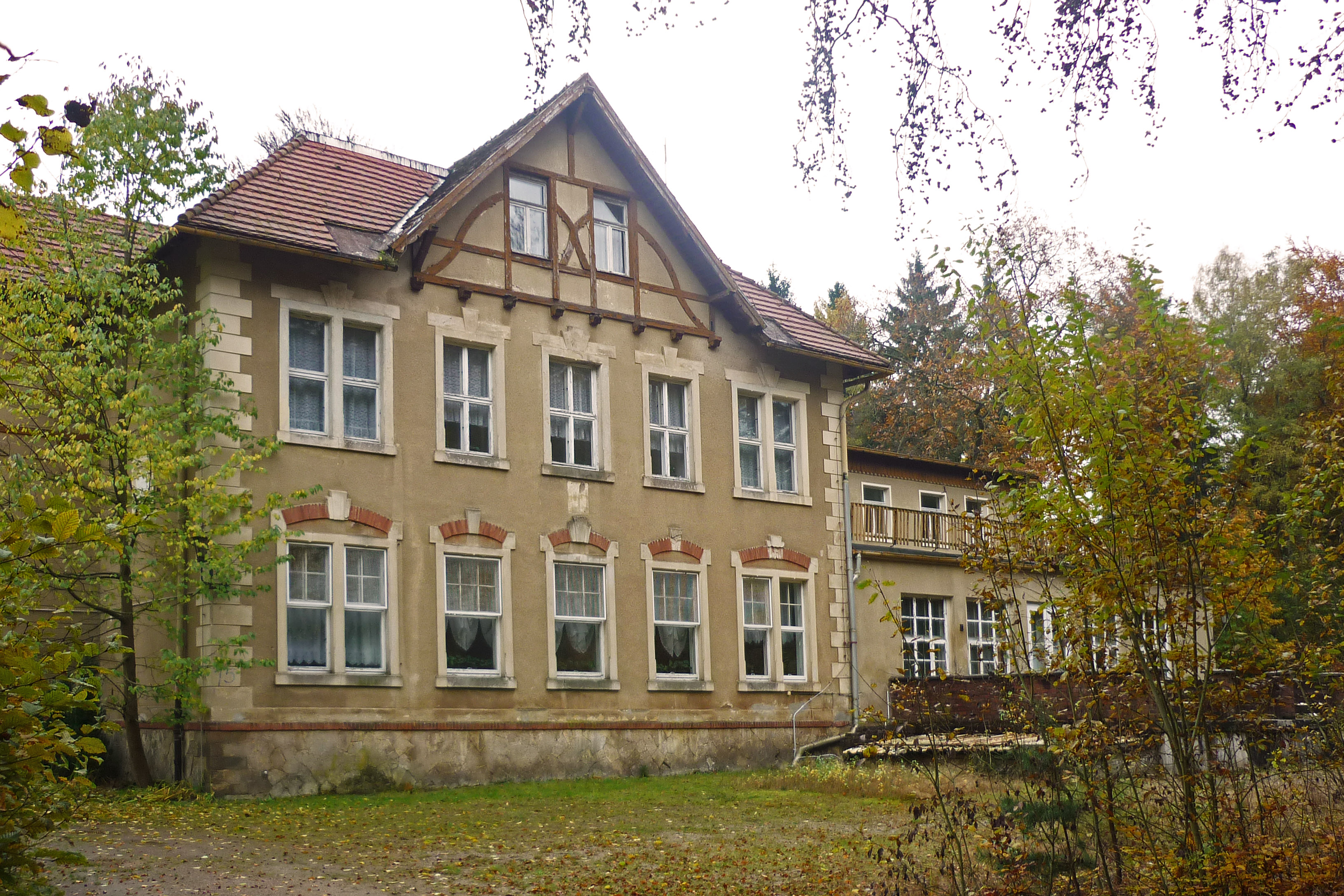 Das ehemalige Joseph-Bondy-Haus in Klingenberg (Sachsen), Frauensteiner Str. 15